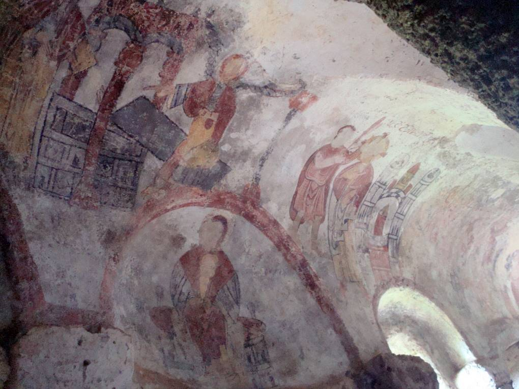 Site des grottes troglodytique de Jonas en Auvergne (France), peintures sur les murs de la chapelle.